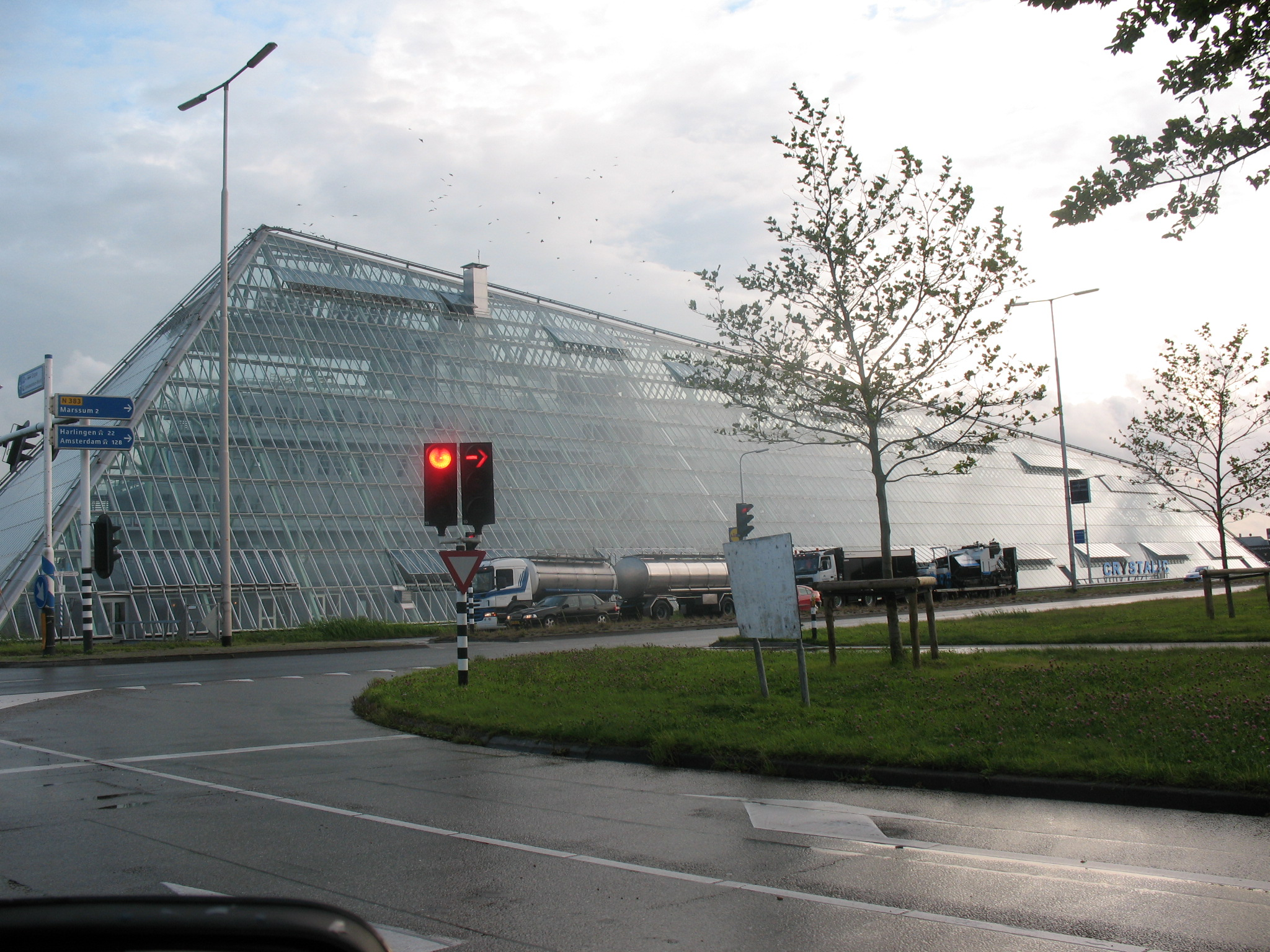 Leeuwarden: Das futuristische Bürogebäude Crystallic auf der Westseite der Stadt